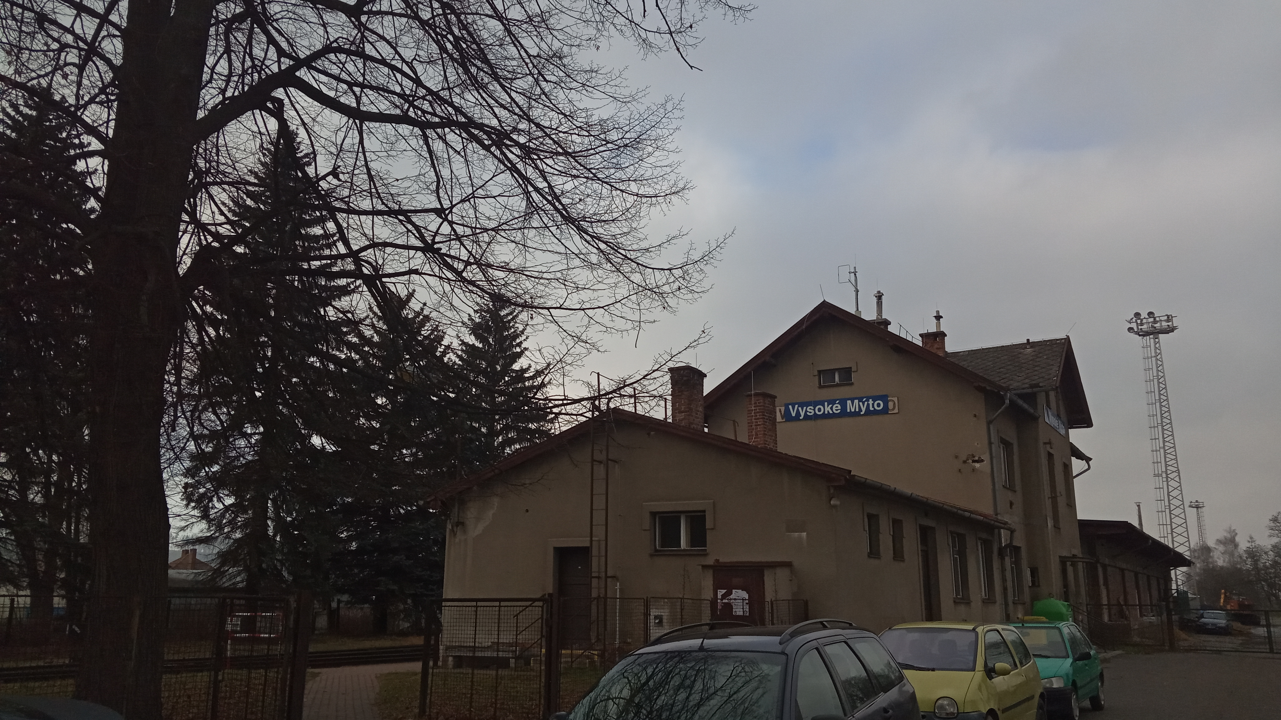 Železniční stanice Vysoké Mýto